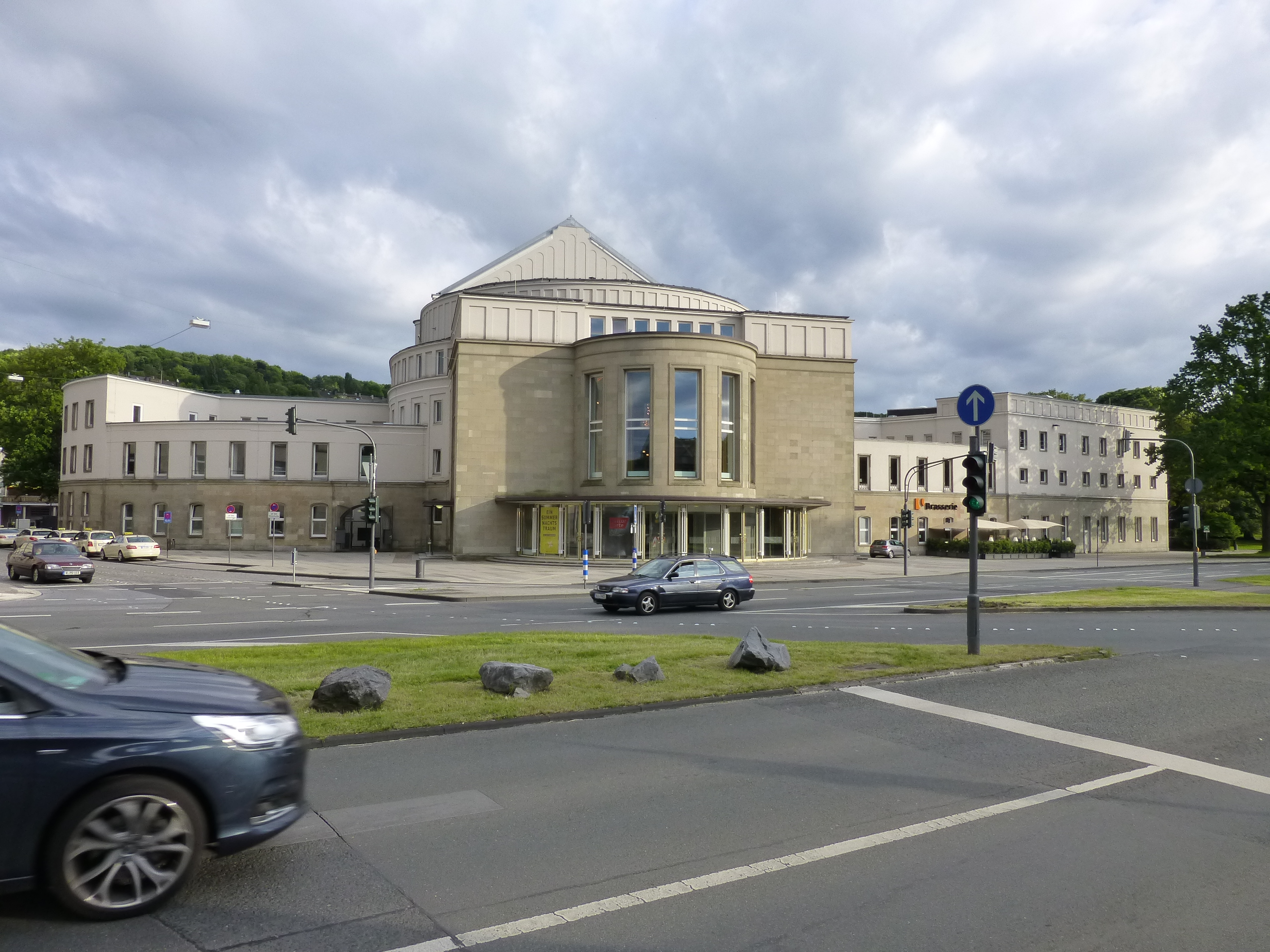 Friedrich-Engels-Allee, Wuppertal